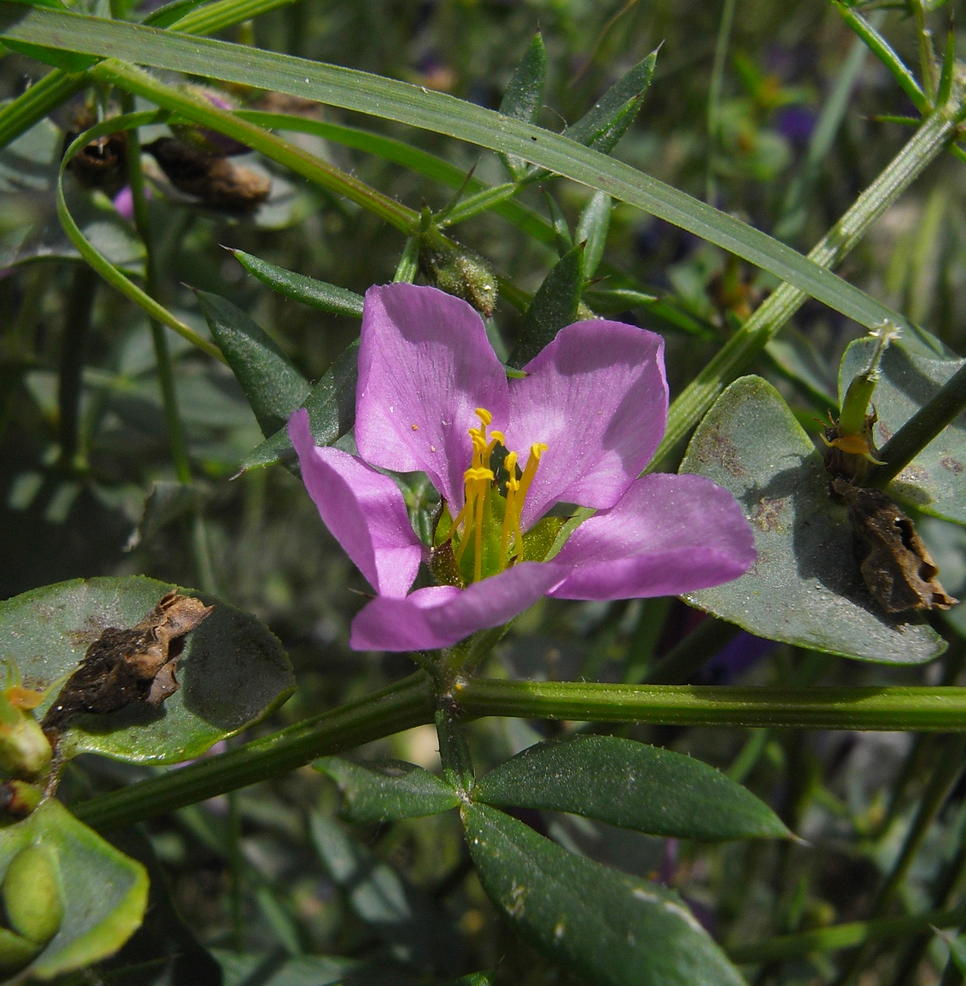 Fagonia cretica, Sousse, Tunesien, Ende April 2009